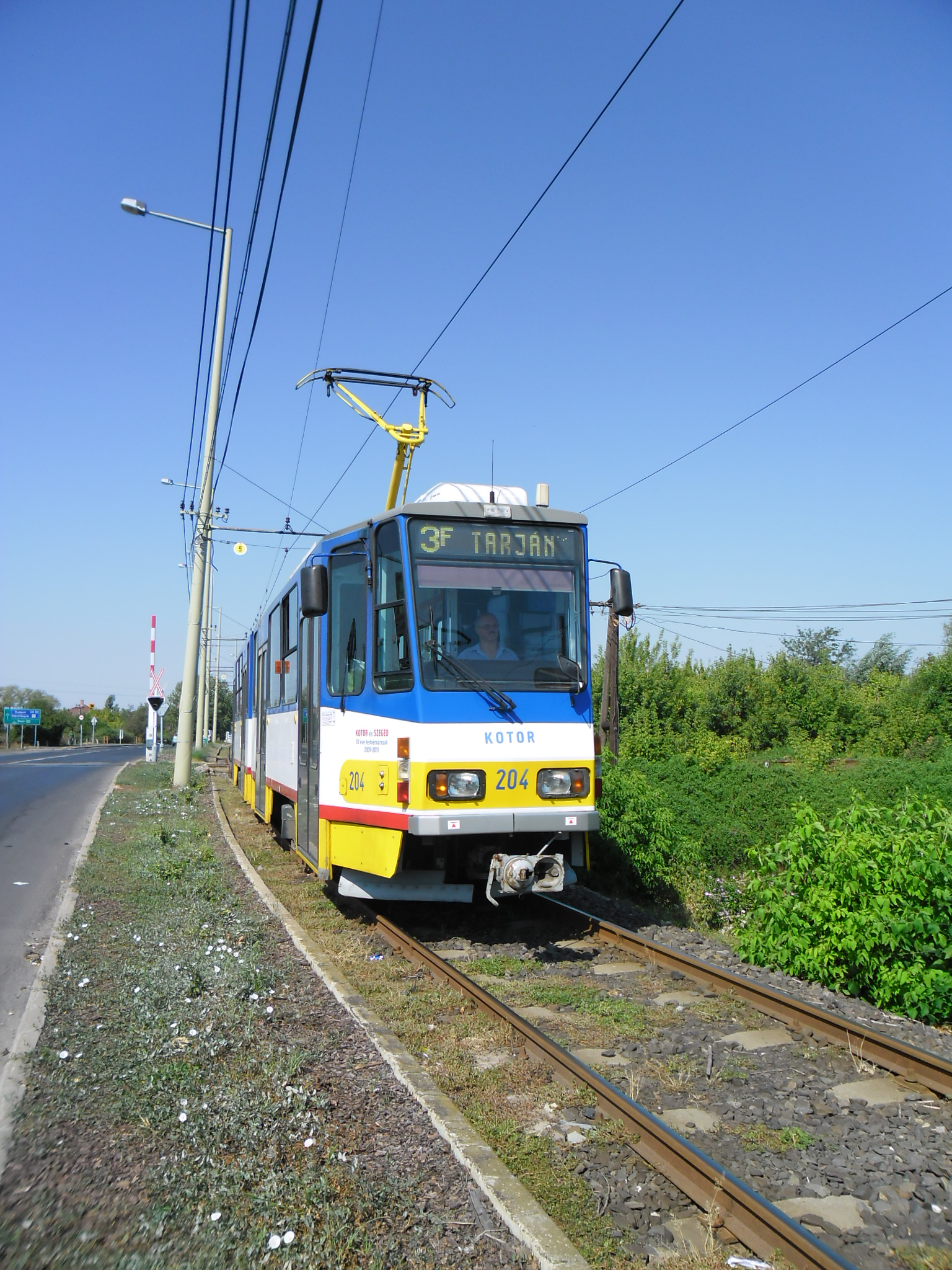 Tramwaj Tatra KT4D w Segedynie.